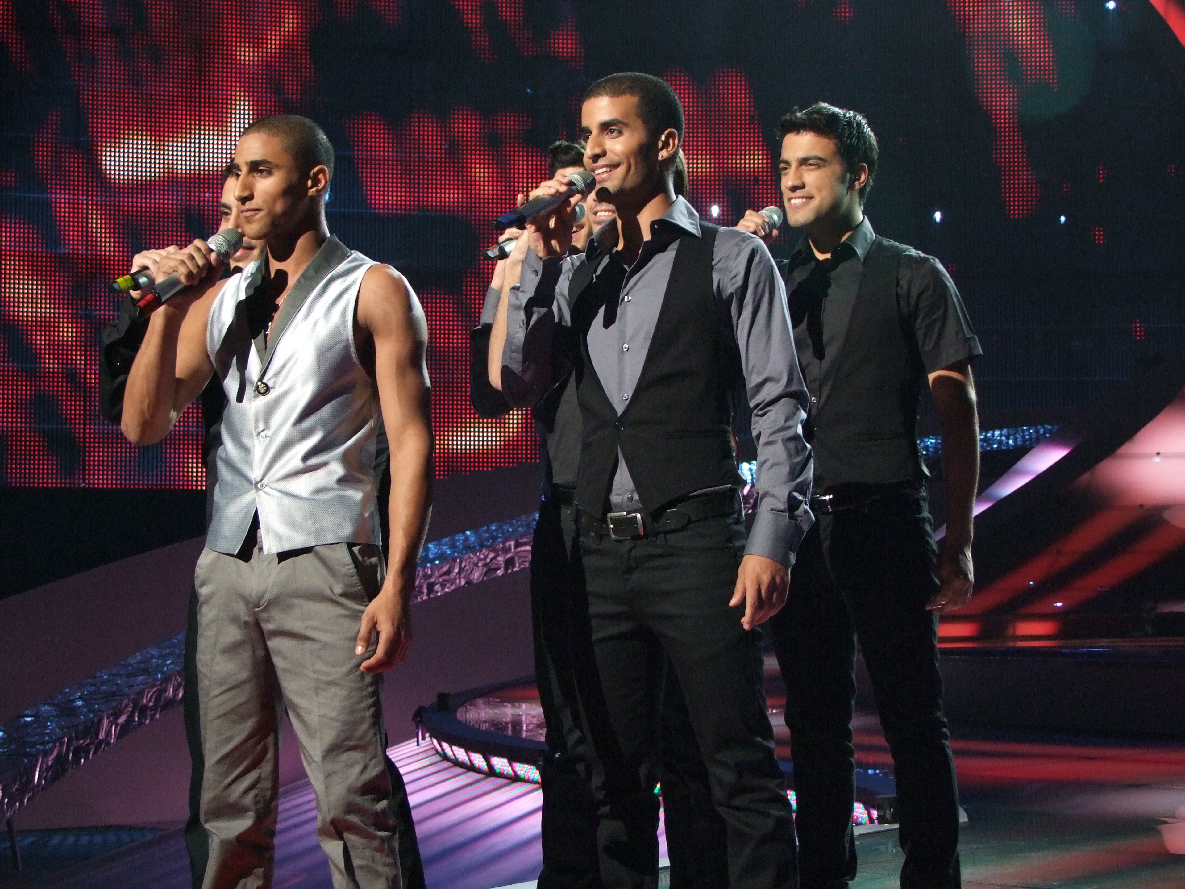 Semifinal 1 EUROVISION 2008